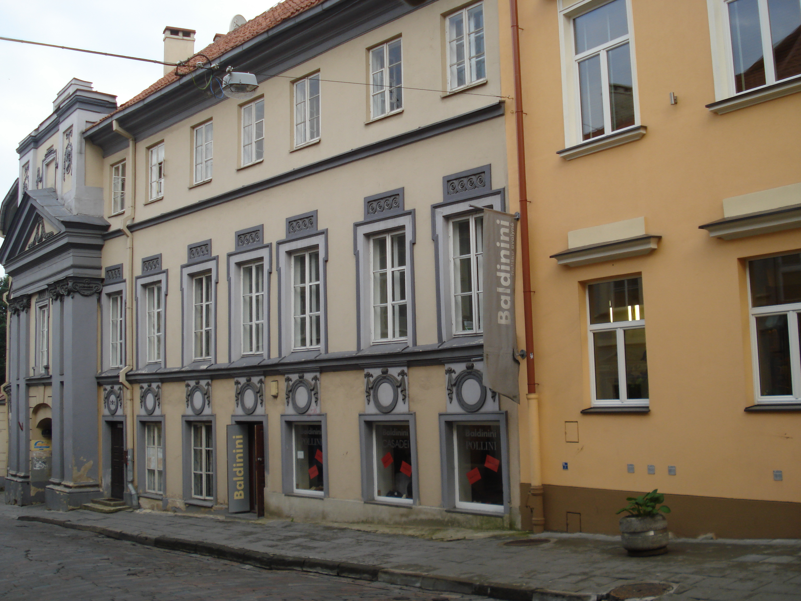 Gureckich Palace in Vilnius, Dominikonų g. 15/1